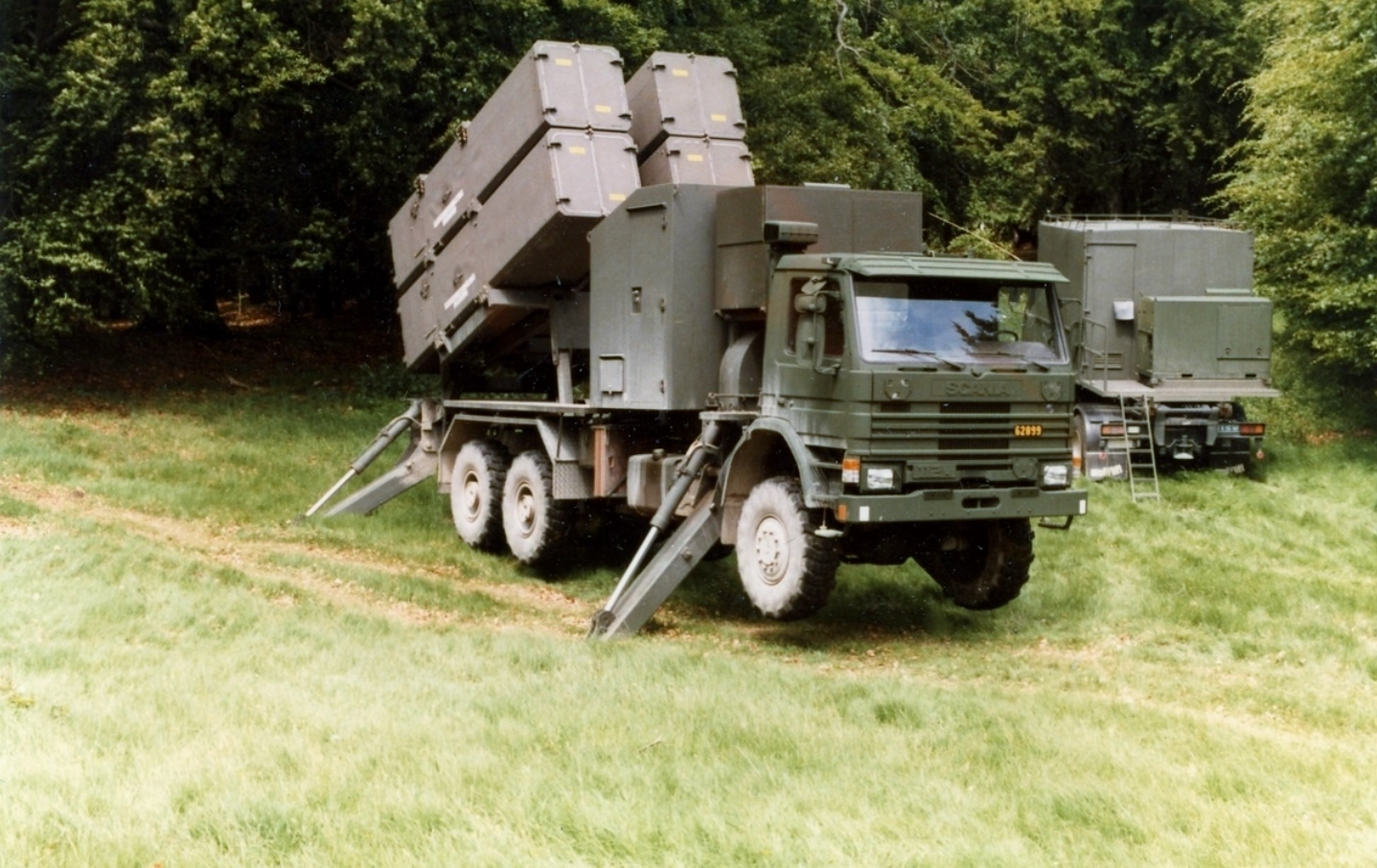 Robotbil 15 KA under utprovning vid marinens provturskommando. IDENTIFIKATIONSNUMMER MRKAF.000063